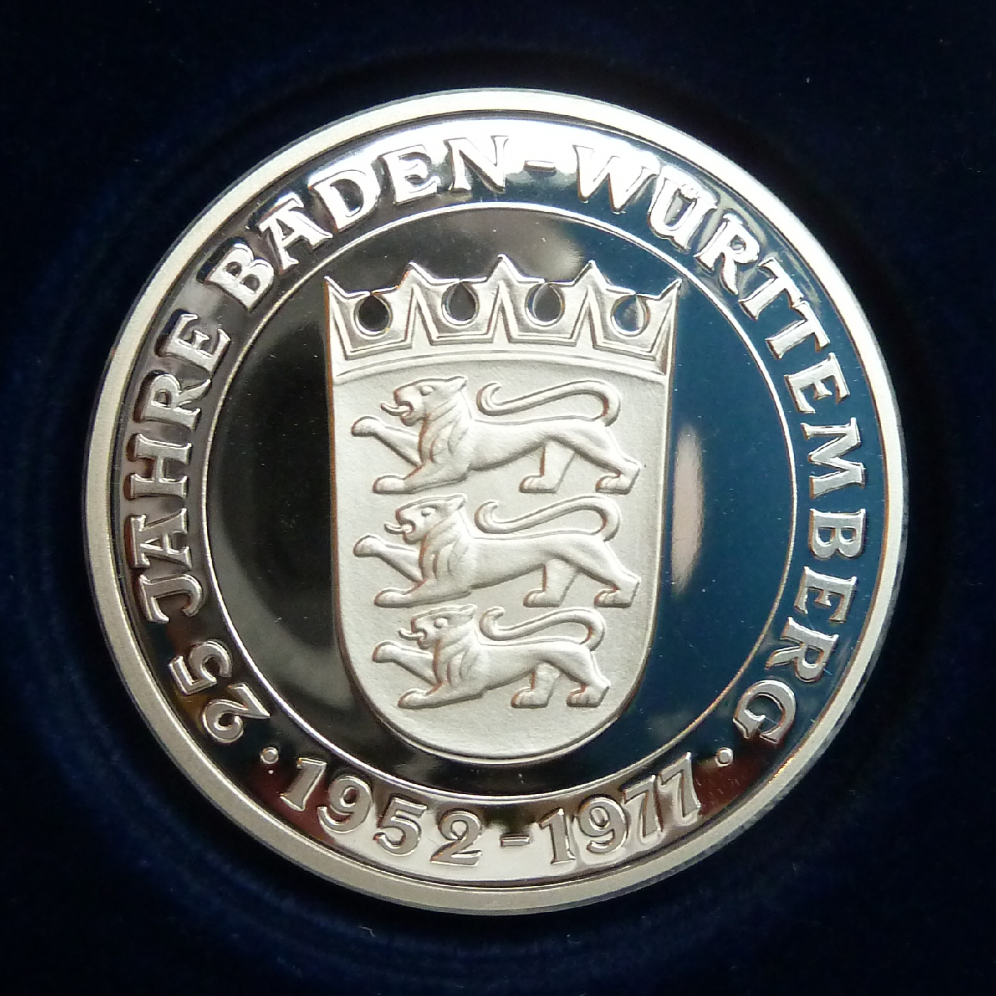 Ehrenmedaille des Ministerpräsidenten des Landes Baden-Württemberg (Rückseite